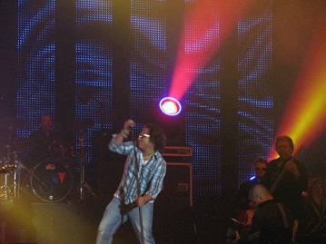 Concierto Mauricio & Palo de Agua